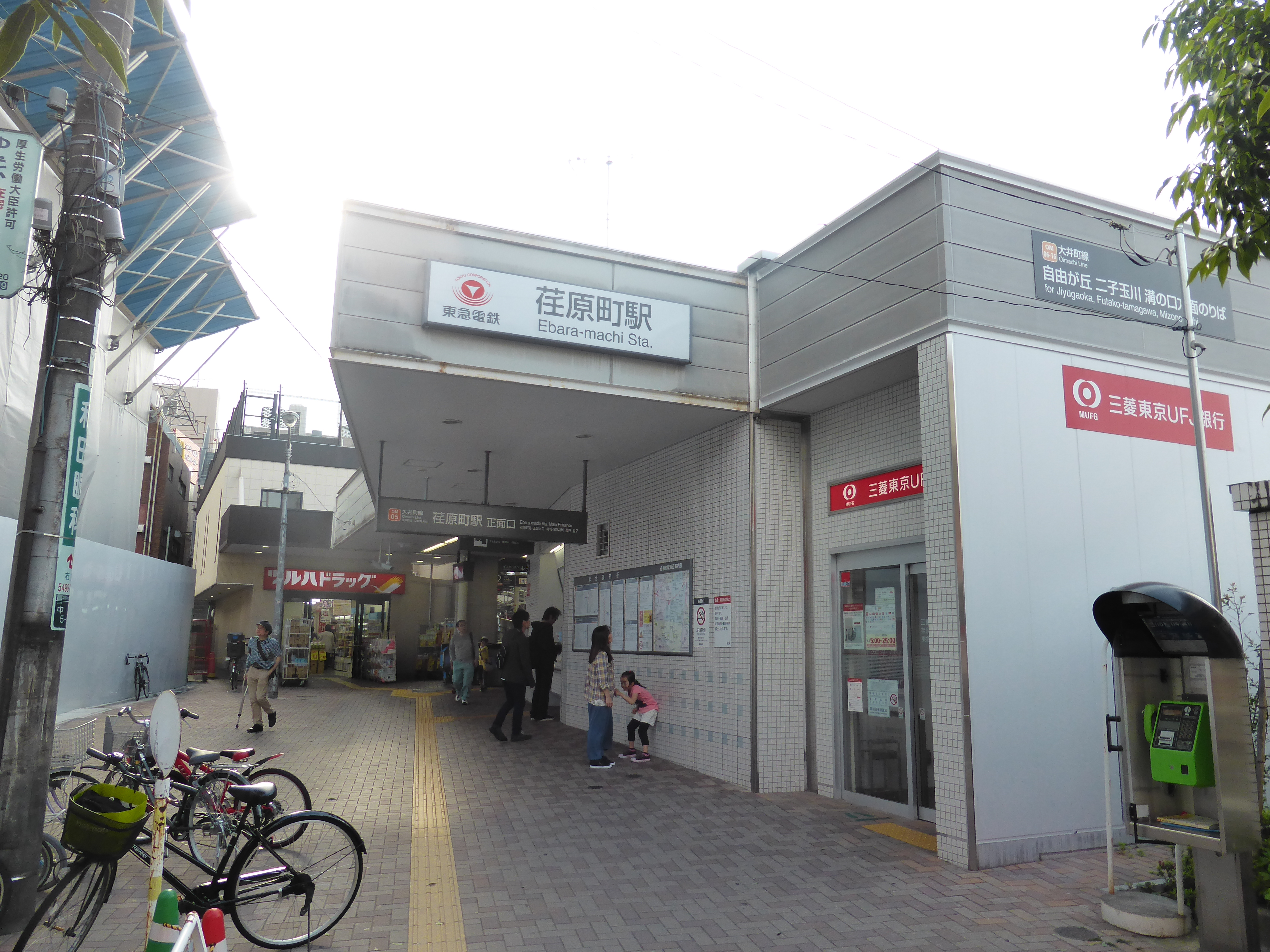 荏原町駅 二子玉川・溝の口方面行き改札口